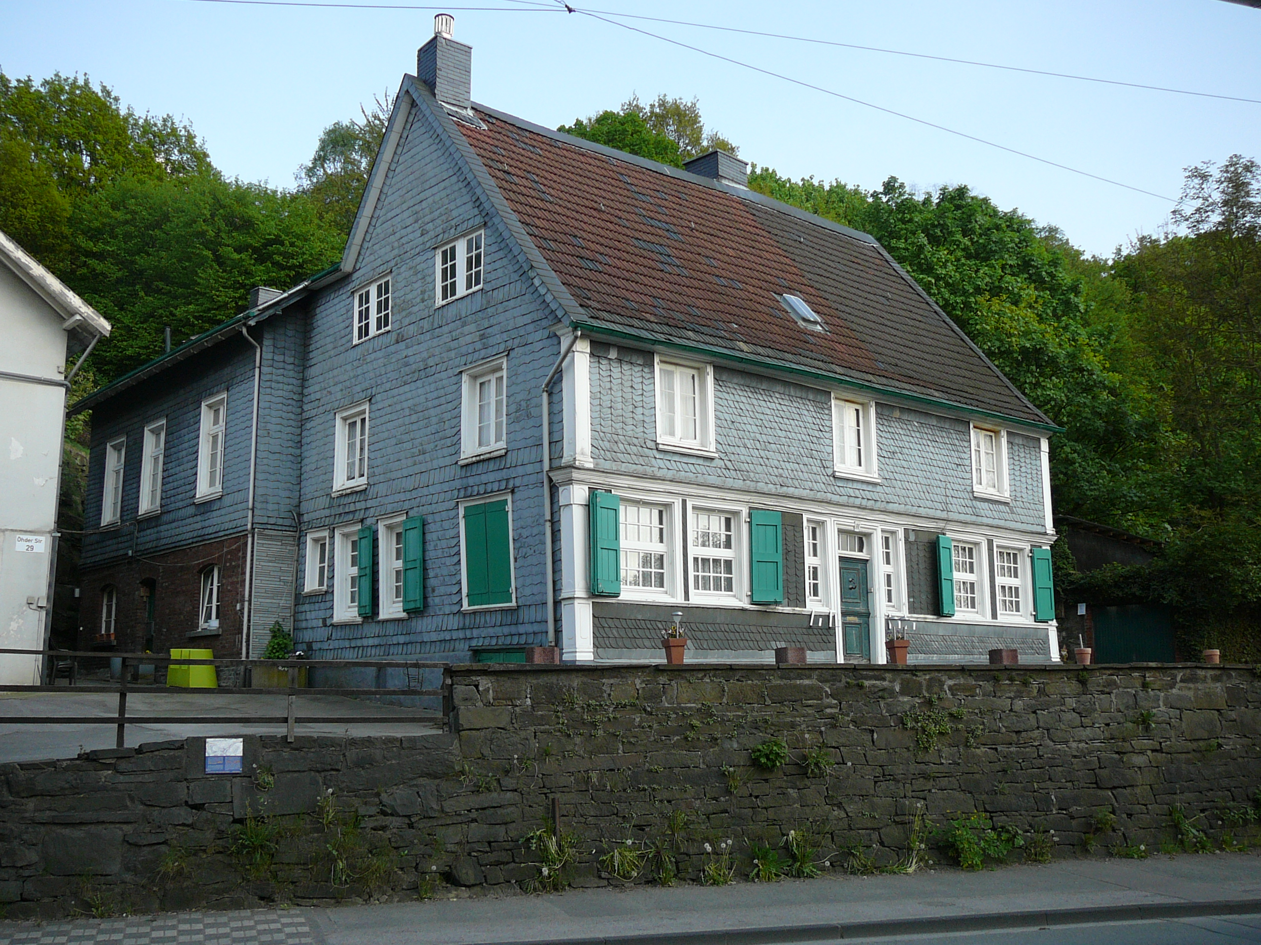 Öhder Str, Wuppertal